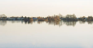 zelf gemaakte foto van de Langeraarse Plassen (gemeente Ter Aar)